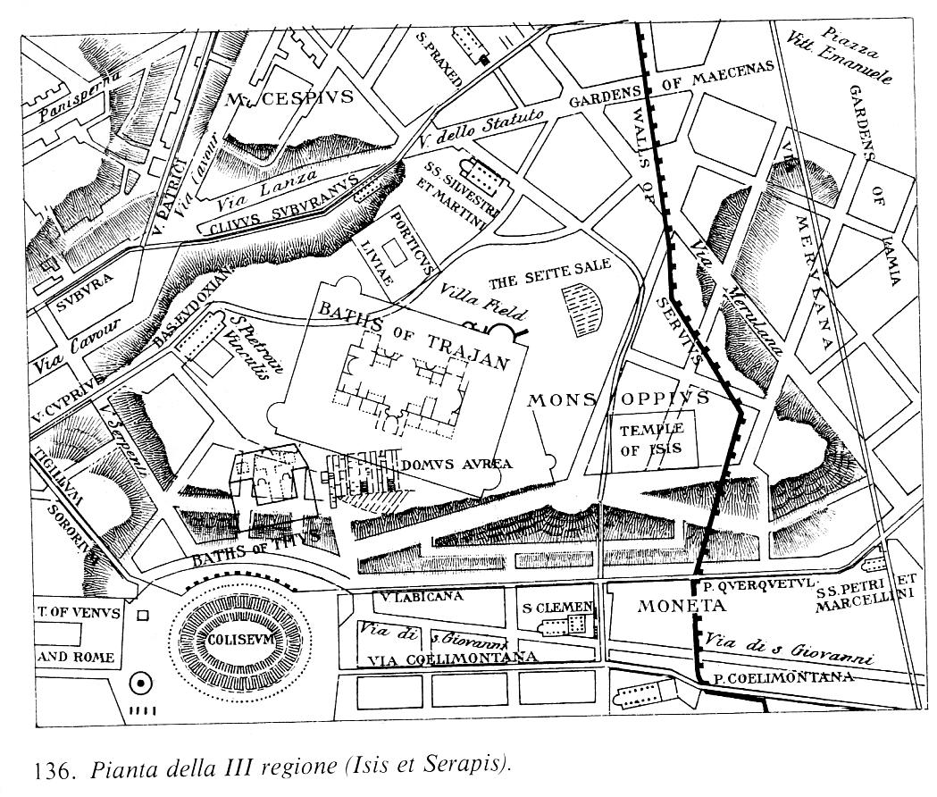 Pianta della Regio III, Isis et Serapis, da Rodolfo Lanciani, The ruins & excavations of ancient Rome, London 1897